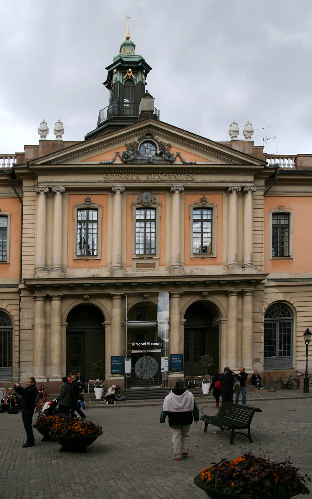 Musée Nobel à Stockholm